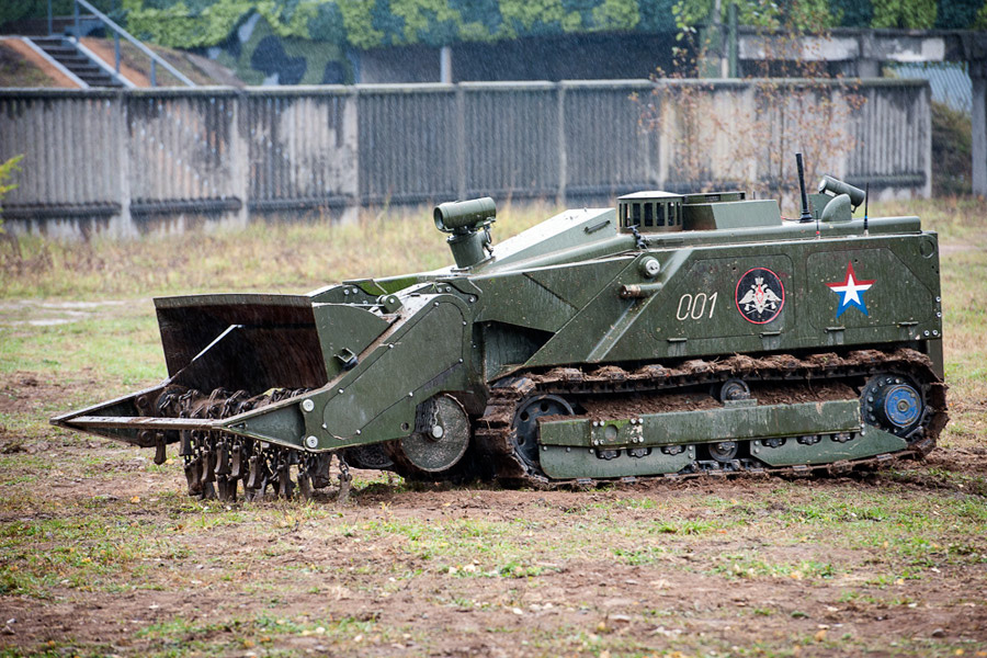 Уран-6 - На полигоне инженерных войск в подмосковном Николо-Урюпино показали боевую работу «робота-сапера» (Уран-6) и «робота-пожарного» (Уран-14)